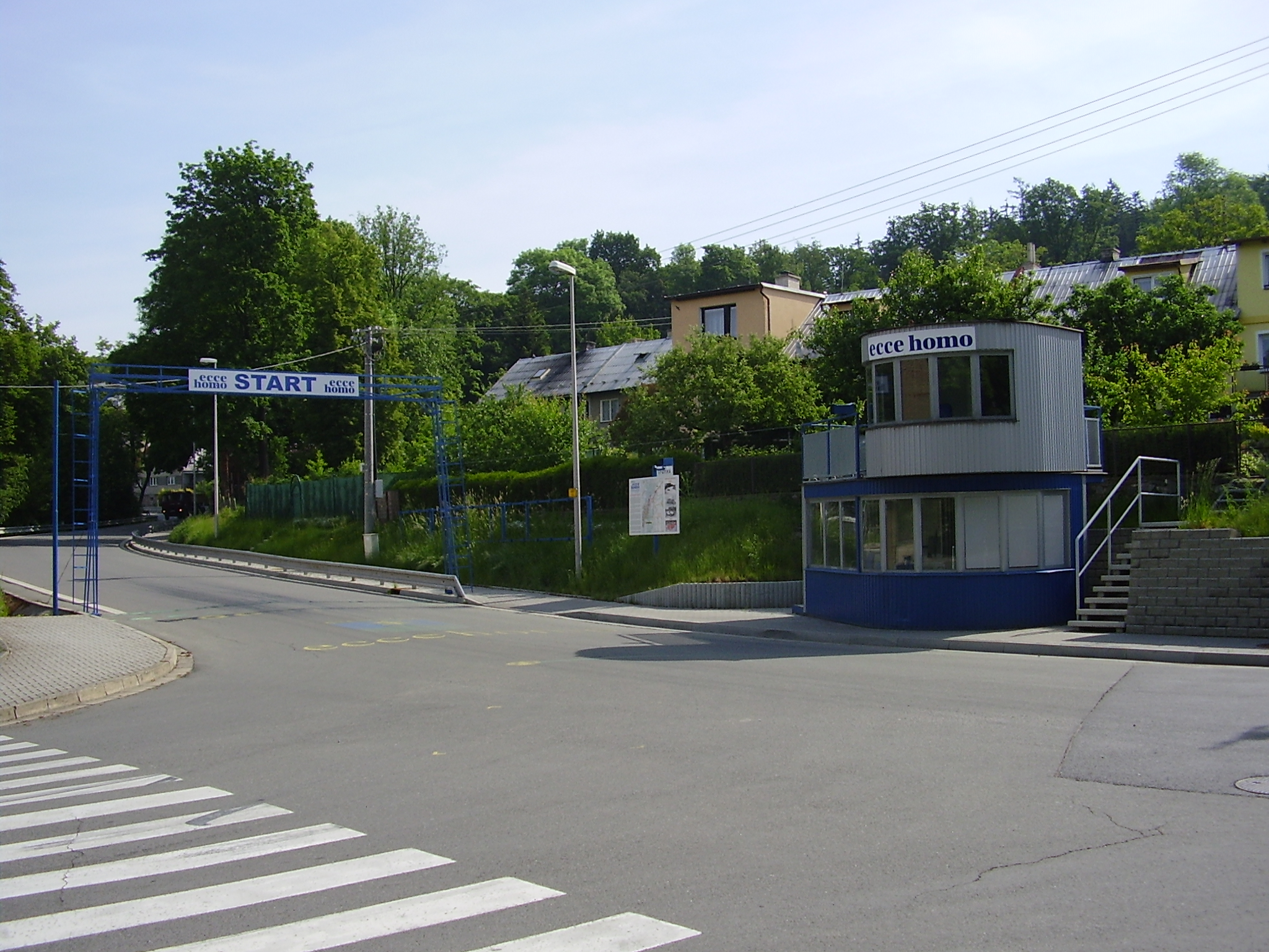 Start an der Bergrennstrecke "Ecce Homo", Šternberk, Tschechien